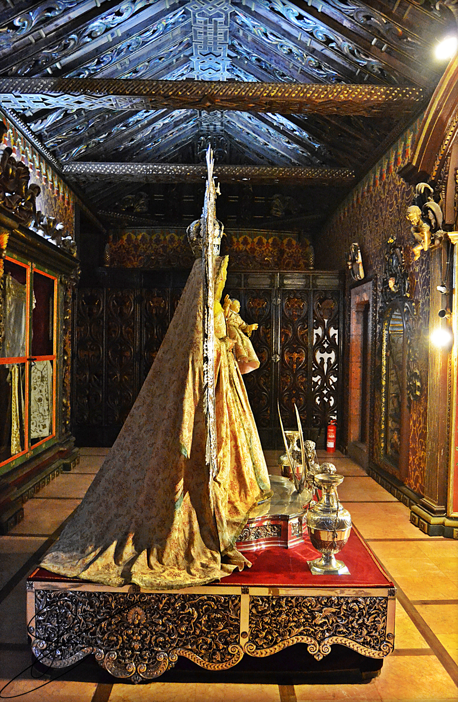 Camarín de Nuestra Señora de Guía Coronada